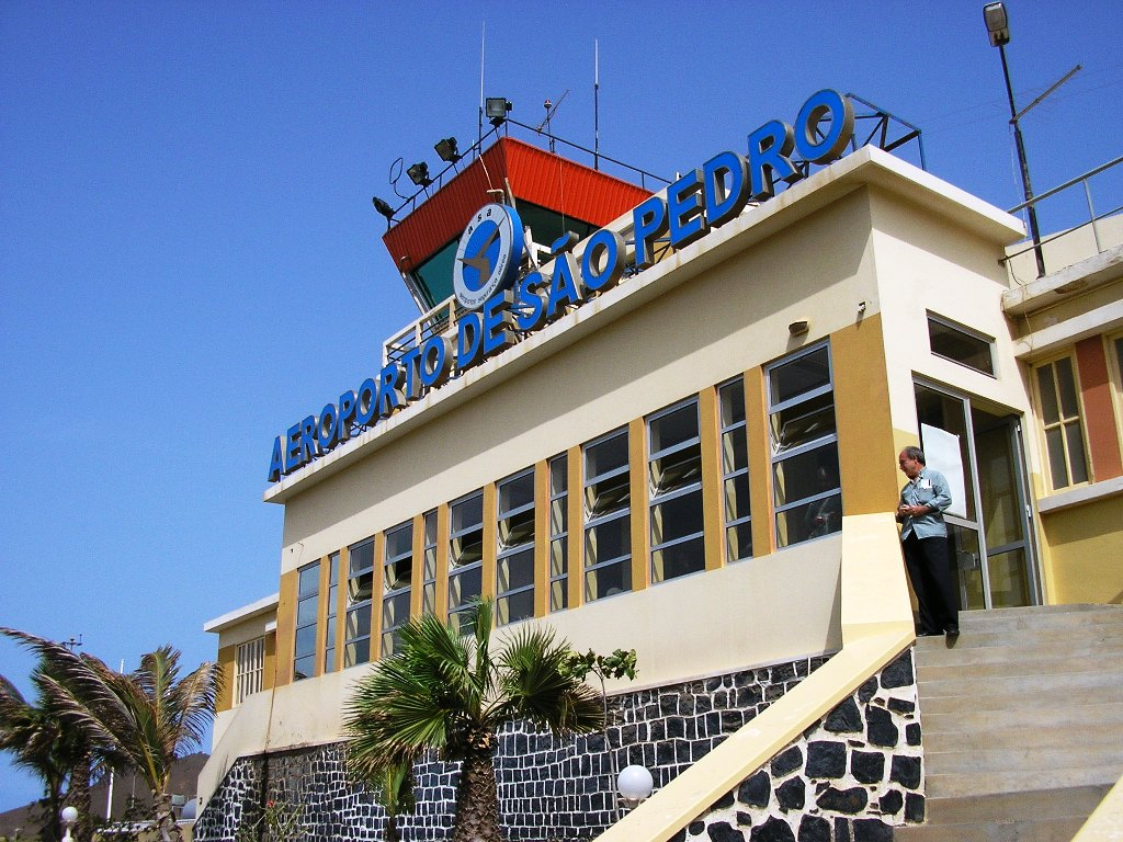 São Pedro airport (VXE) at São Vicente island, Cape Verde